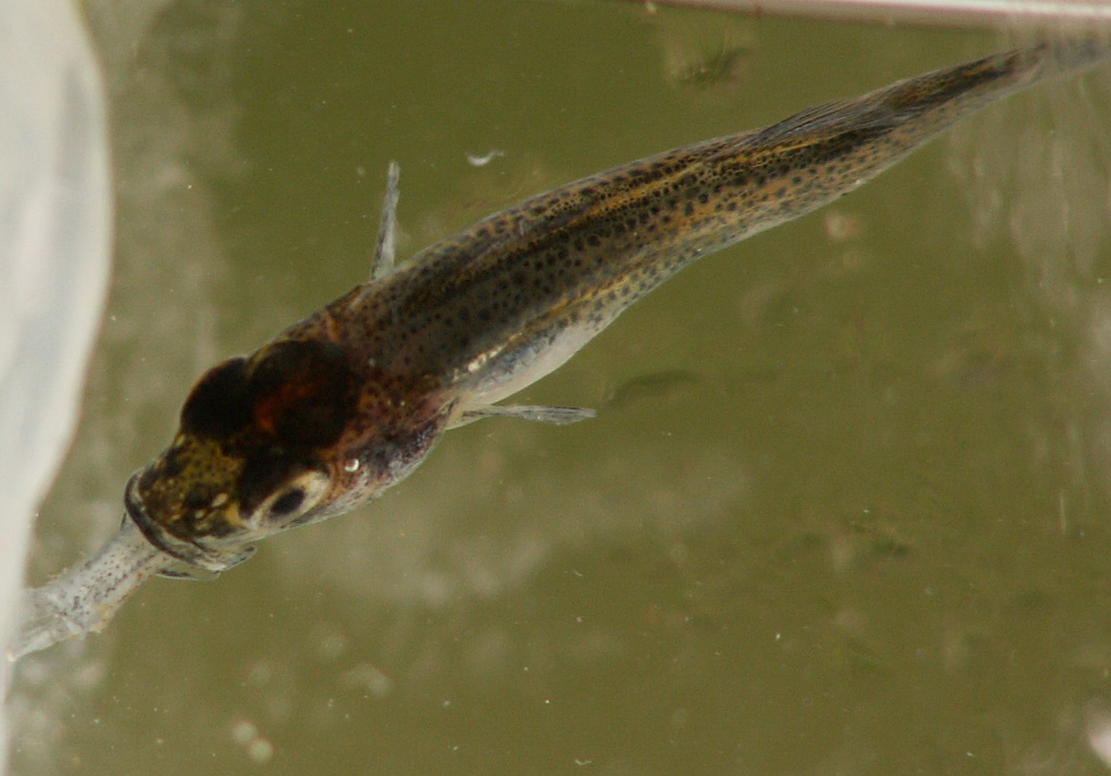 Klein kannibalistisch baarsje uit voedselarm ven - Small cannibalistic perch from acid moor pool in Drenthe, The Netherlands.